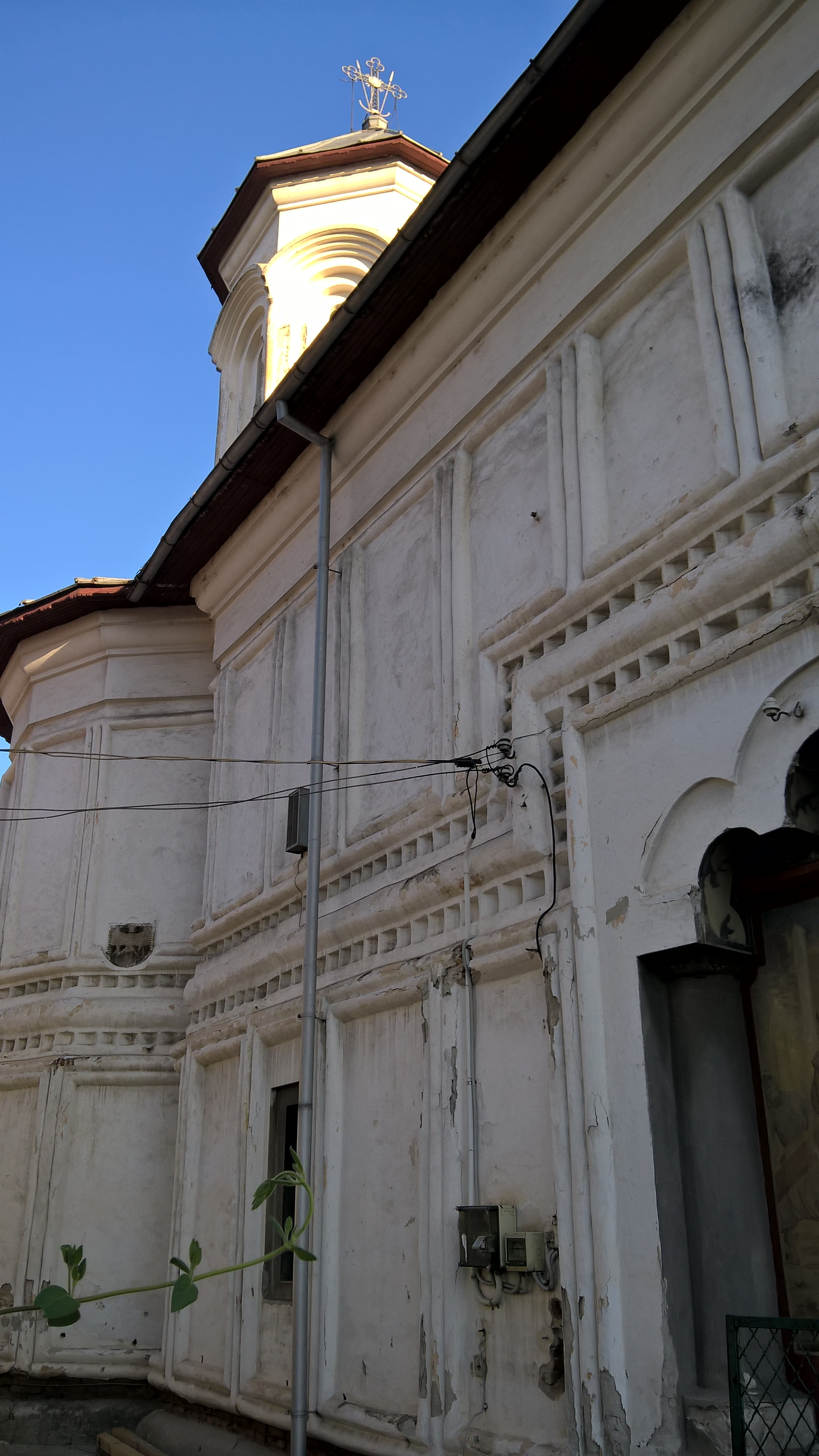 Biserica „Sf. Gheorghe-Vechi”, „Cuvioasa Paraschiva”